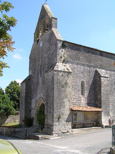 église de Sonneville